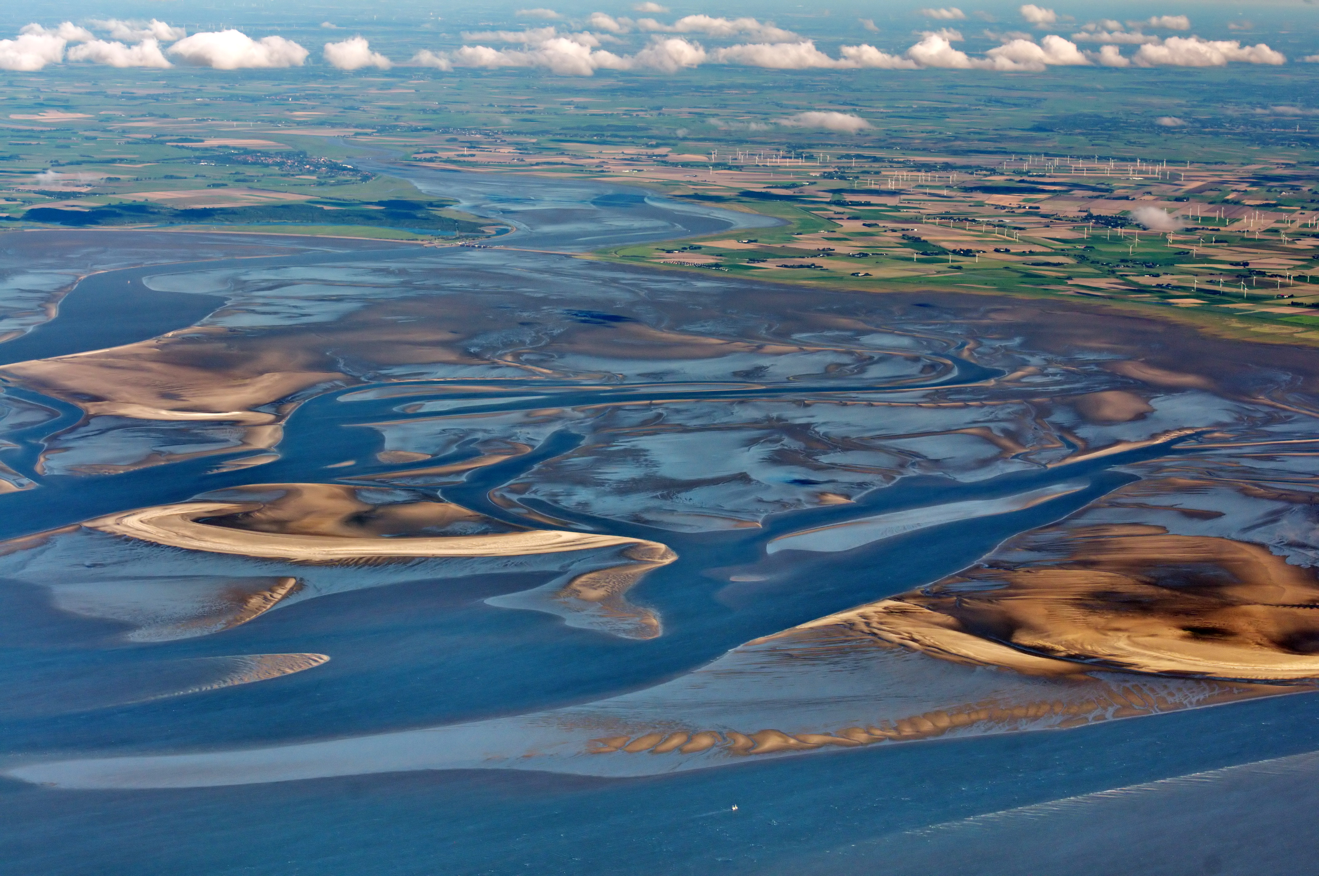 Fotoflug über das nordfriesische Wattenmeer - Eidersperrwerk (von SW), davor Linnenplate mit Linnensand (links), NN (Mitte), Blauortsand (rechts)